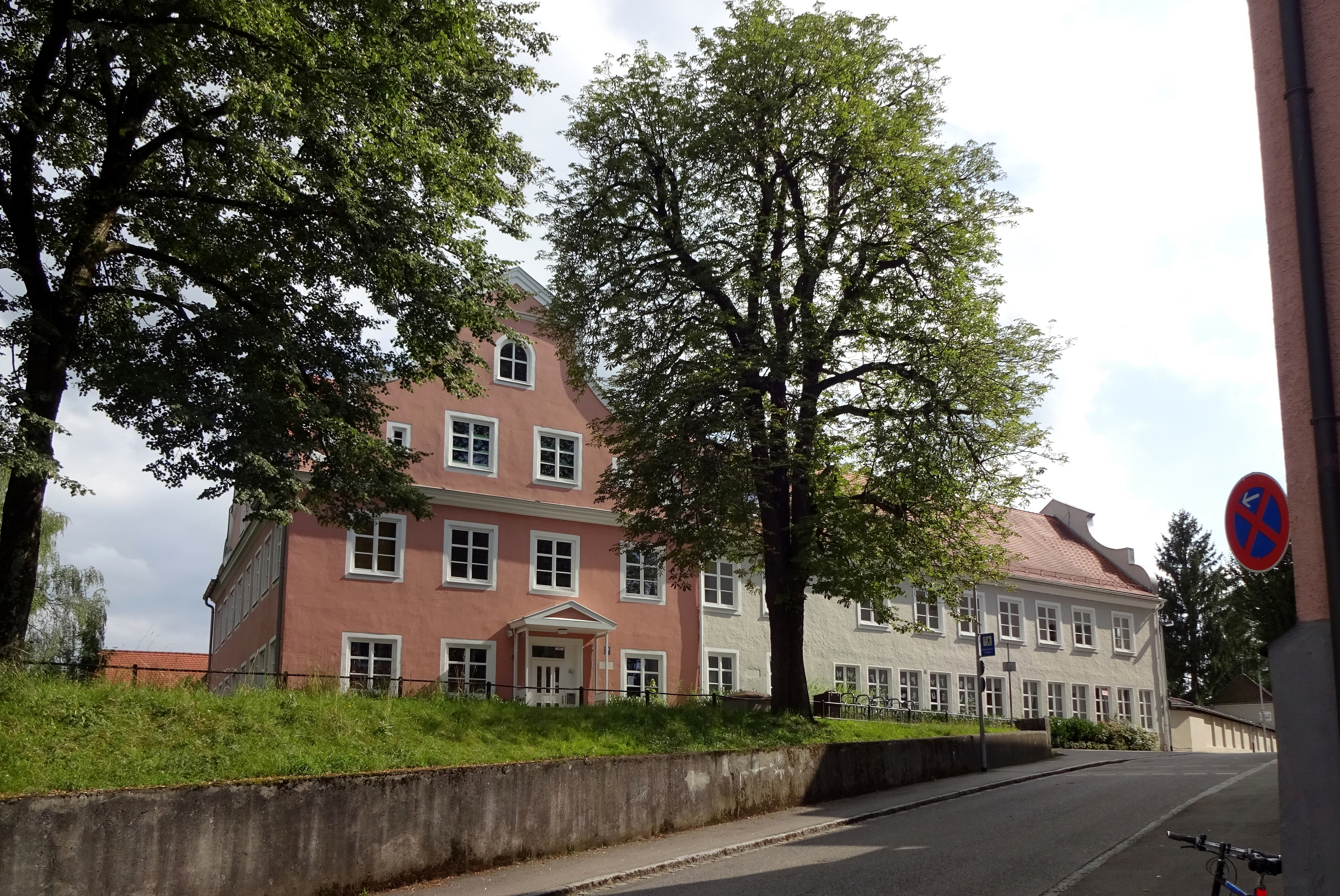 Fürstenschule Kempten 2014